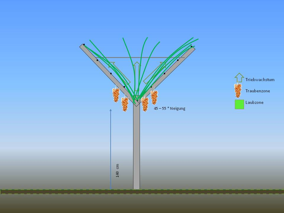 Y-Erziehung